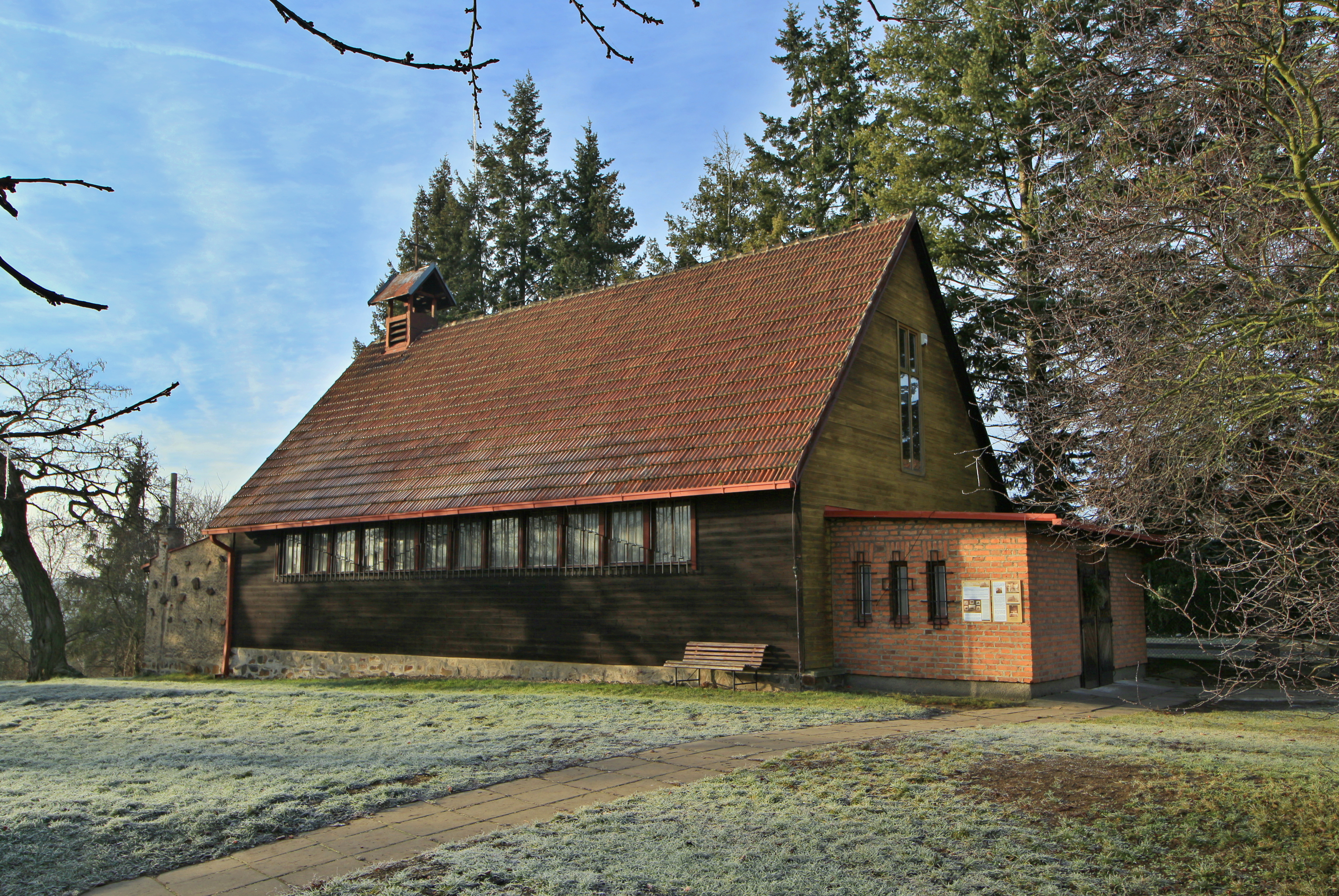 Praha-Krč, kostelík sv. Františka z Assisi